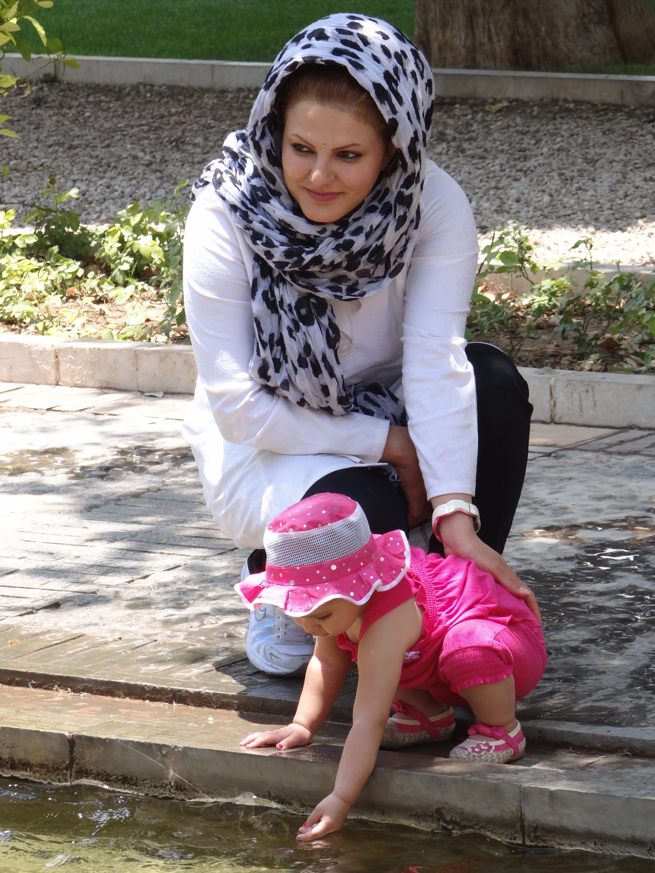 Mother and Daughter at Bagh-e Jahan Garden - Shiraz - Western Iran